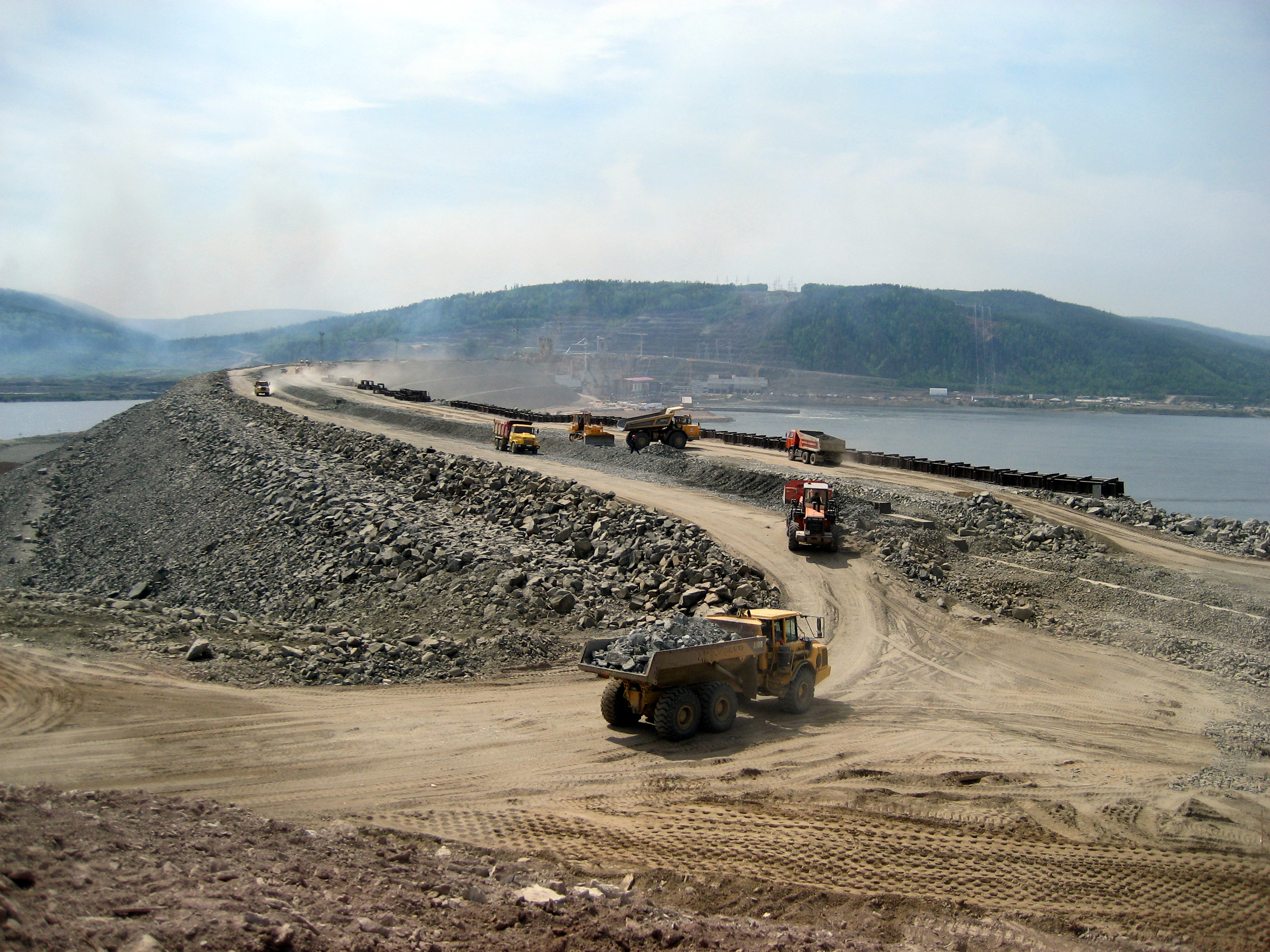 Каменно-набросная плотина Богучанской ГЭС